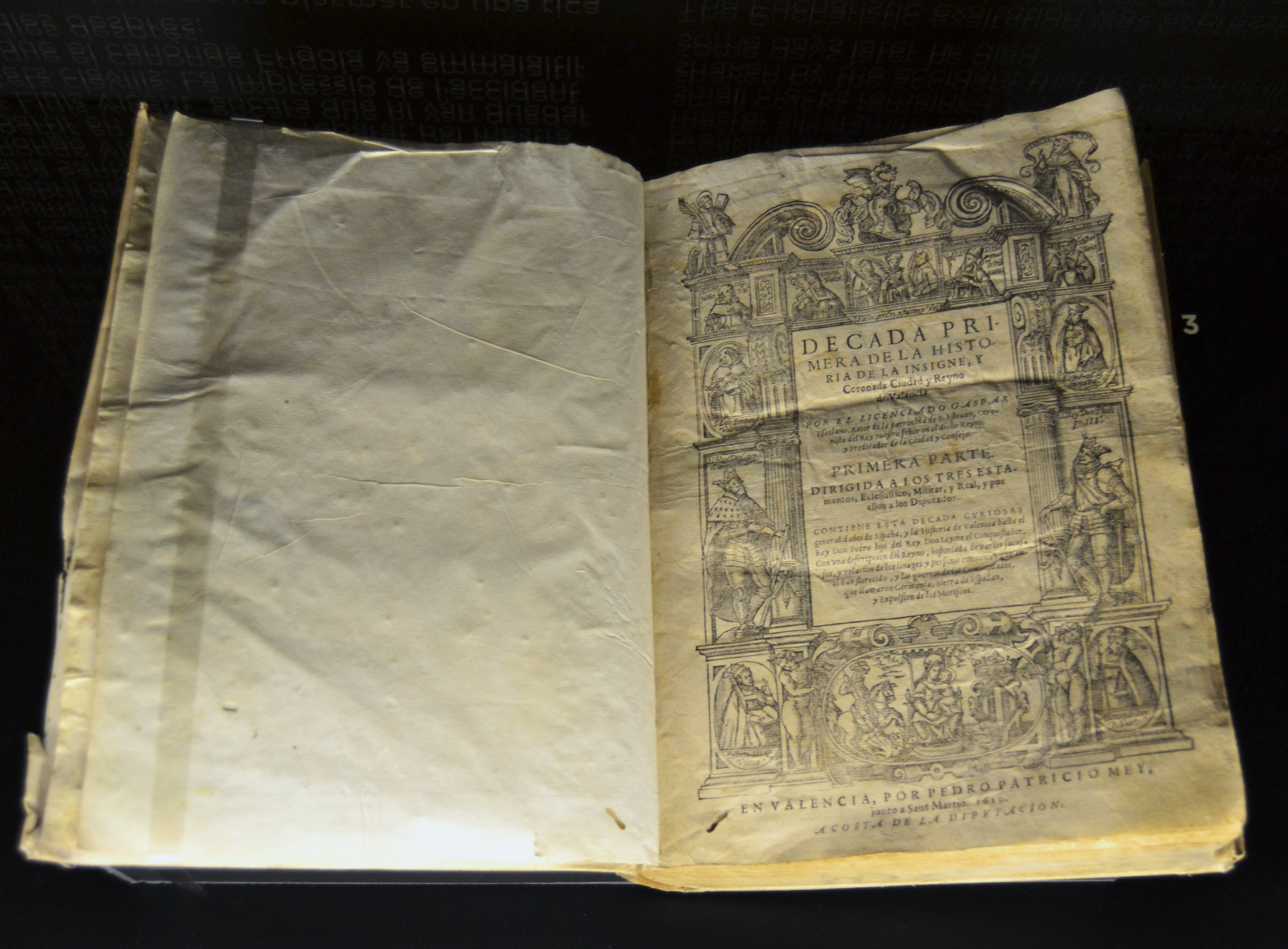 Gaspar Escolano, Décadas de la historia de la insignes y coronada ciudad de Valencia, 1610. Reial Col·legi del Corpus Christi de València.